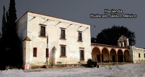 haciendahuascato This image contains digital watermarking or credits in the image itself. The usage of visible watermarks is discouraged. If a non-watermarked version of the image is available, please upload it under the same file name and then remove this template. Ensure that removed information is present in the image description page and replace this template with metadata from image or attribution metadata from licensed image . Caution: Before removing a watermark from a copyrighted image, please read the WMF's analysis of the legal ramifications of doing so, as well as Commons' proposed policy regarding watermarks. If the old version is still useful, for example if removing the watermark damages the image significantly, upload the new version under a different title so that both can be used. After uploading the non-watermarked version, replace this template with superseded|new filename|version without watermarks .